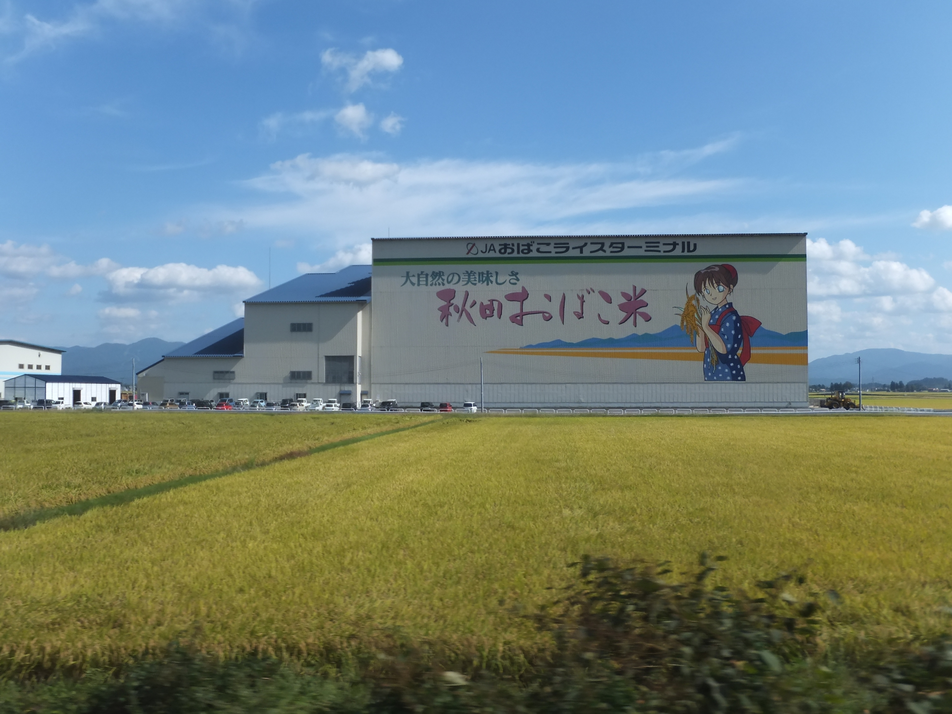 JA秋田おばこライスターミナル。秋田新幹線こまち車中より撮影。羽後四ツ屋駅付近を通過中に見える巨大な「萌え倉庫」としておなじみである。